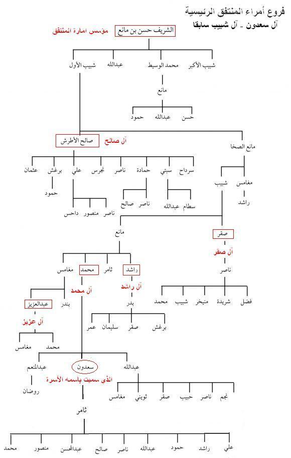 رسم يوضح فروع أسرة السعدون الرئيسية وهو عبارة عن جهد شخصي لجمع الفروع الرئيسية برسم واحد فقط ، وتم أخذ الأسماء من موقع أسرة السعدون على الأنترنت على الرابط التالي